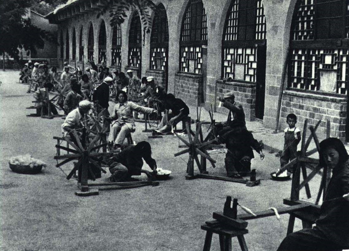 1967-10 1936年延安大生产运动